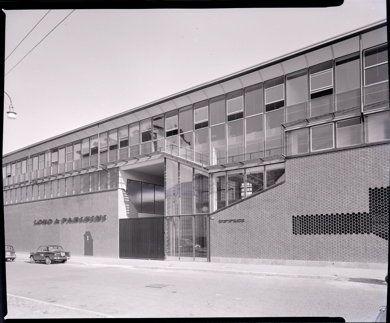 Servizio fotografico : Milano, 1960 / Paolo Monti. - Buste: 2, Fototipi: 2 : Negativo b/n, gelatina bromuro d'argento/ pellicola ; 10x12. - ((Serie costituita da 2 negativi identificati con i nn.: 4231, 4234. La suddetta serie è contenuta nella scatola identificata con la numerazione 4132-4341G. - Via Savona. Via Nievo. - Fonte: Rubrica di Paolo Monti: Archivio 10x12 (ultimi numerati) - dal G1 al (s.d.), presso Archivio Paolo Monti